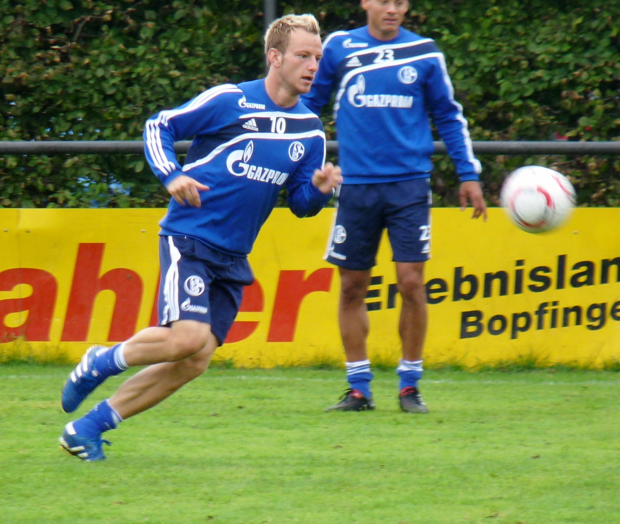 Ivan Rakitic und Jermaine Jones (hinten) während einer Trainingseinheit